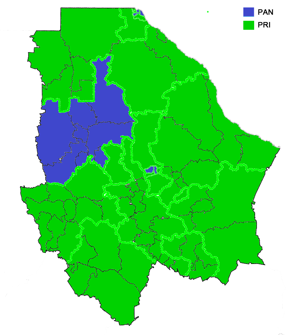 Diputaciones electas en el Estado de Chihuahua por partido.